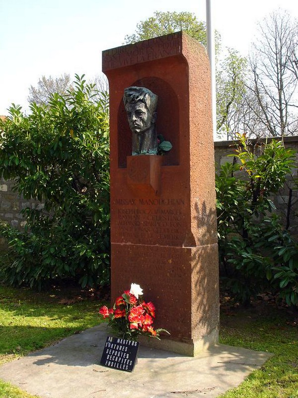 Памятник Мисаку Манушяну, руководителю антифашистского движения Сопротивления в годы Второй Мировой войны во Франции.Туф, бронза.1978.Париж. Ivry-sur-Seine